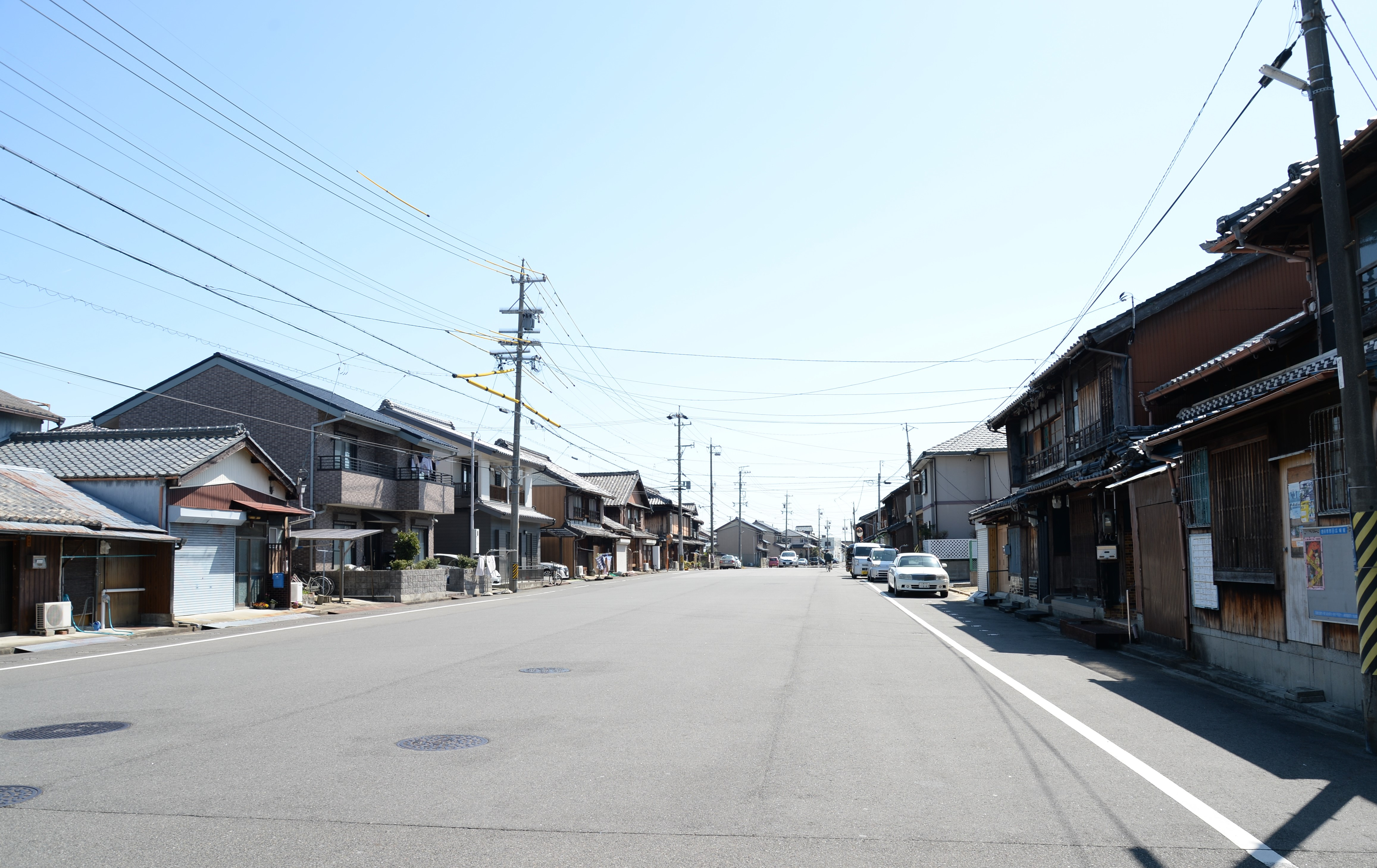 広小路通り